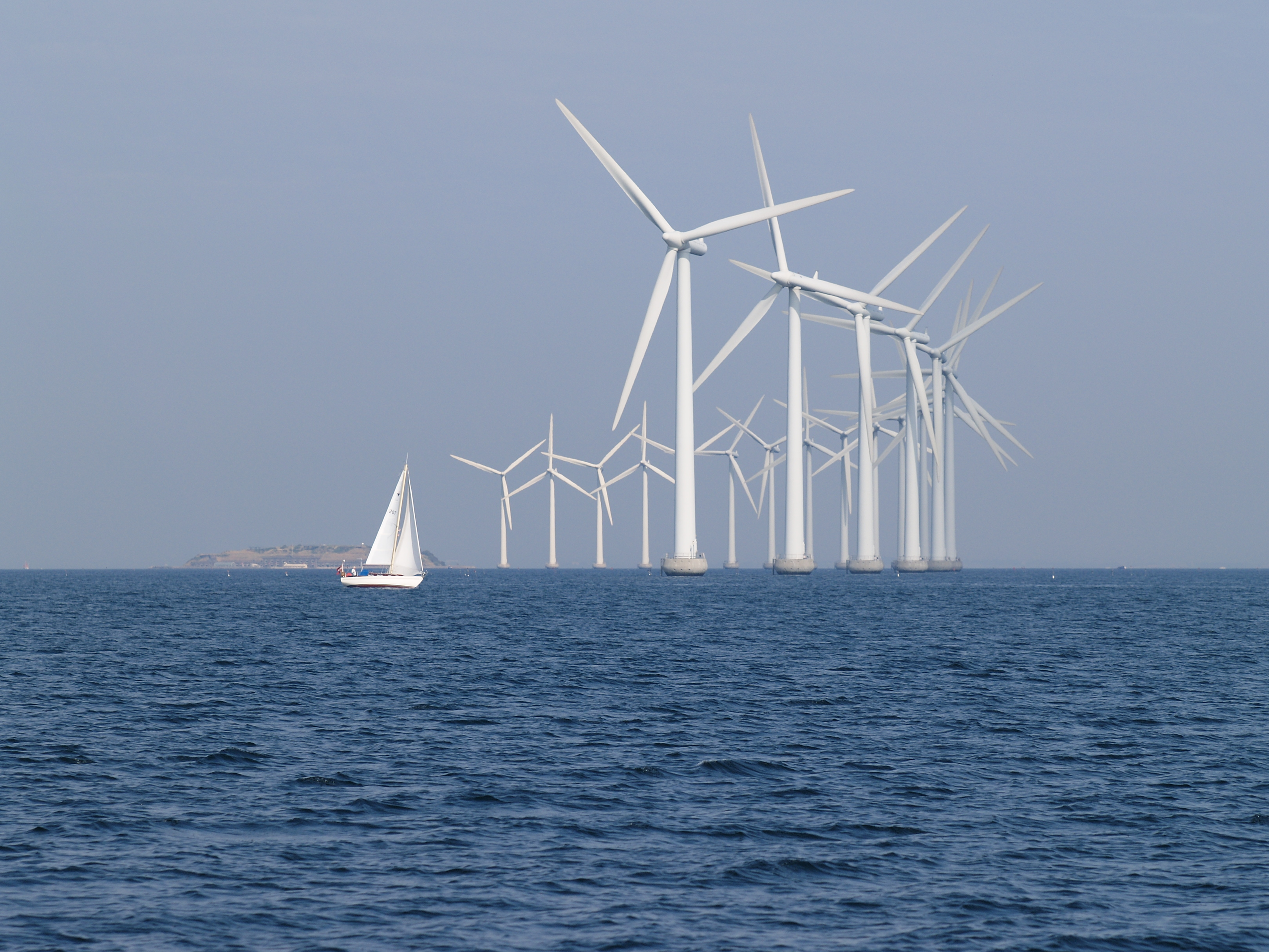 Windpark südlich der im Hintergrund liegenden Insel Middelgrundsfortet im Öresund östlich Kopenhagen, Dänemark, Nutzung von Wind althergebracht und modern